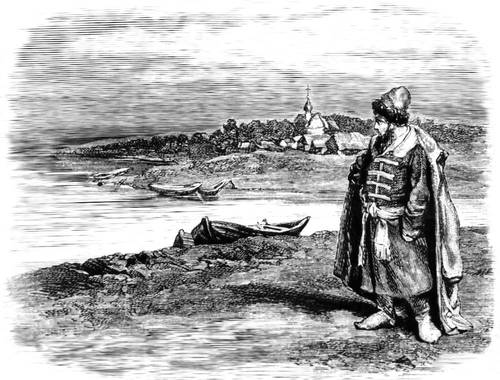 Klavdiy Lebedev (1852-1916). Sadko.